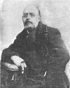 Retrato del periodista y escritor español Manuel Ossorio y Bernard, en la revista Pluma y Lápiz.